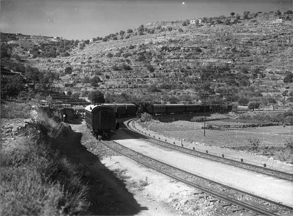 ביתר - תחנת הרכבת.